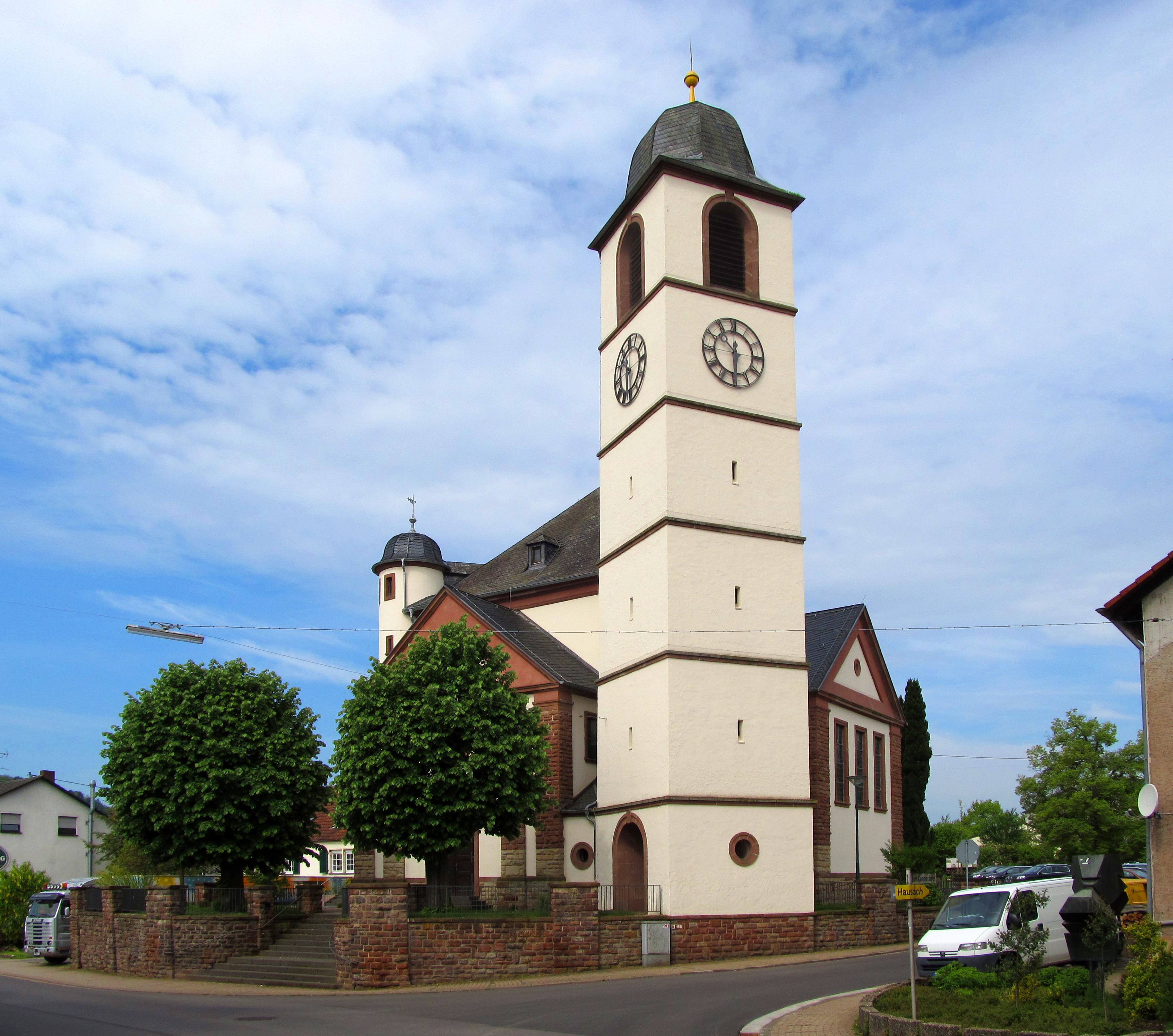 Die katholische Pfarrkirche St. Willibrord in Bachem, einem Ortsteil der Gemeinde Losheim am See, Landkreis Merzig-Wadern, Saarland